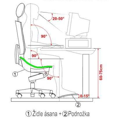 Zachování uhlů podle principů ergonomie při sezení na židli Ásana.